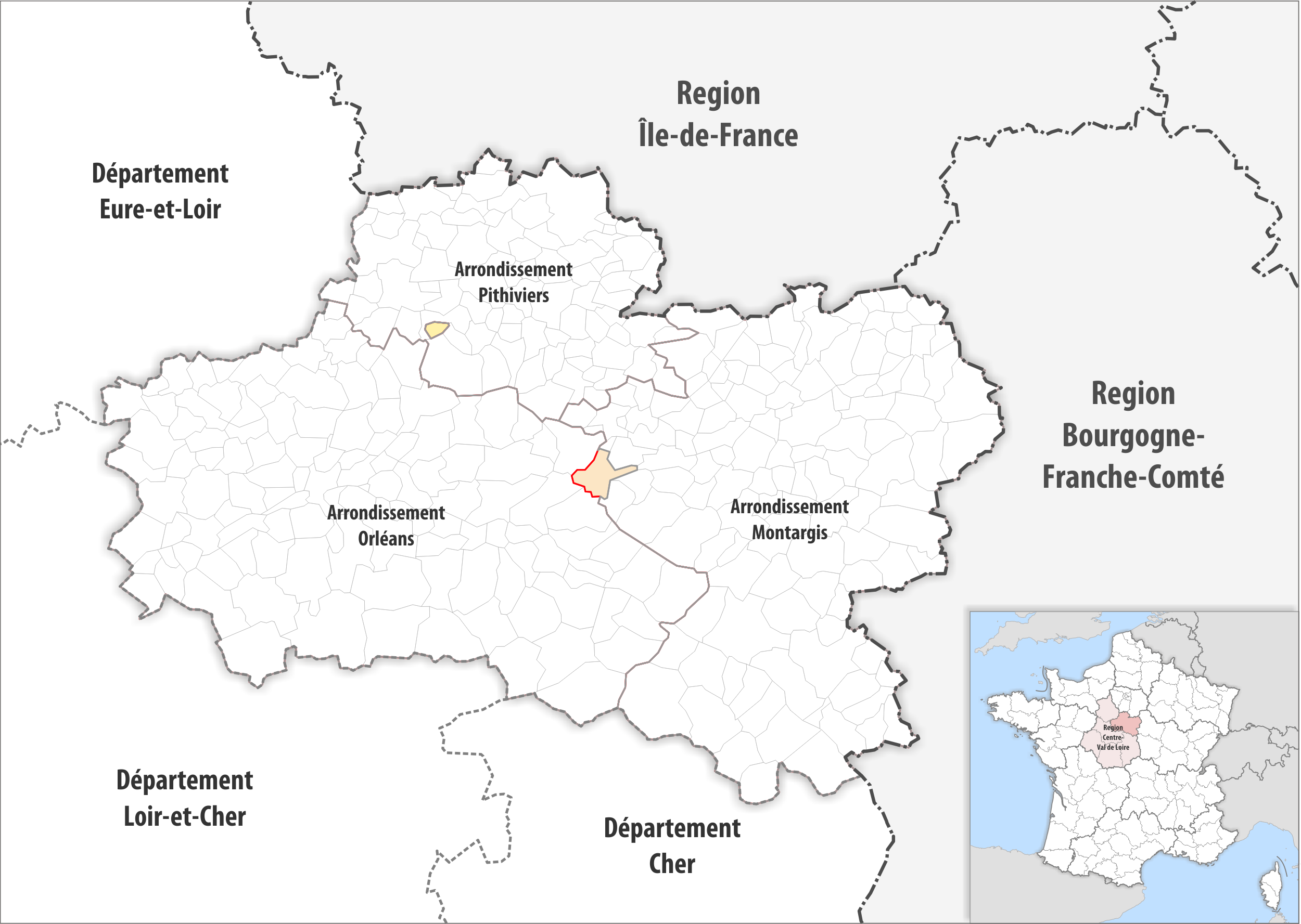 Arrondissements Anpassungen auf 2017 im Departement Loiret